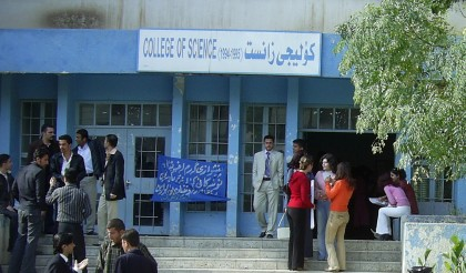 Suleimania. Studenter ved Universitetet i Suleimania november 2005.